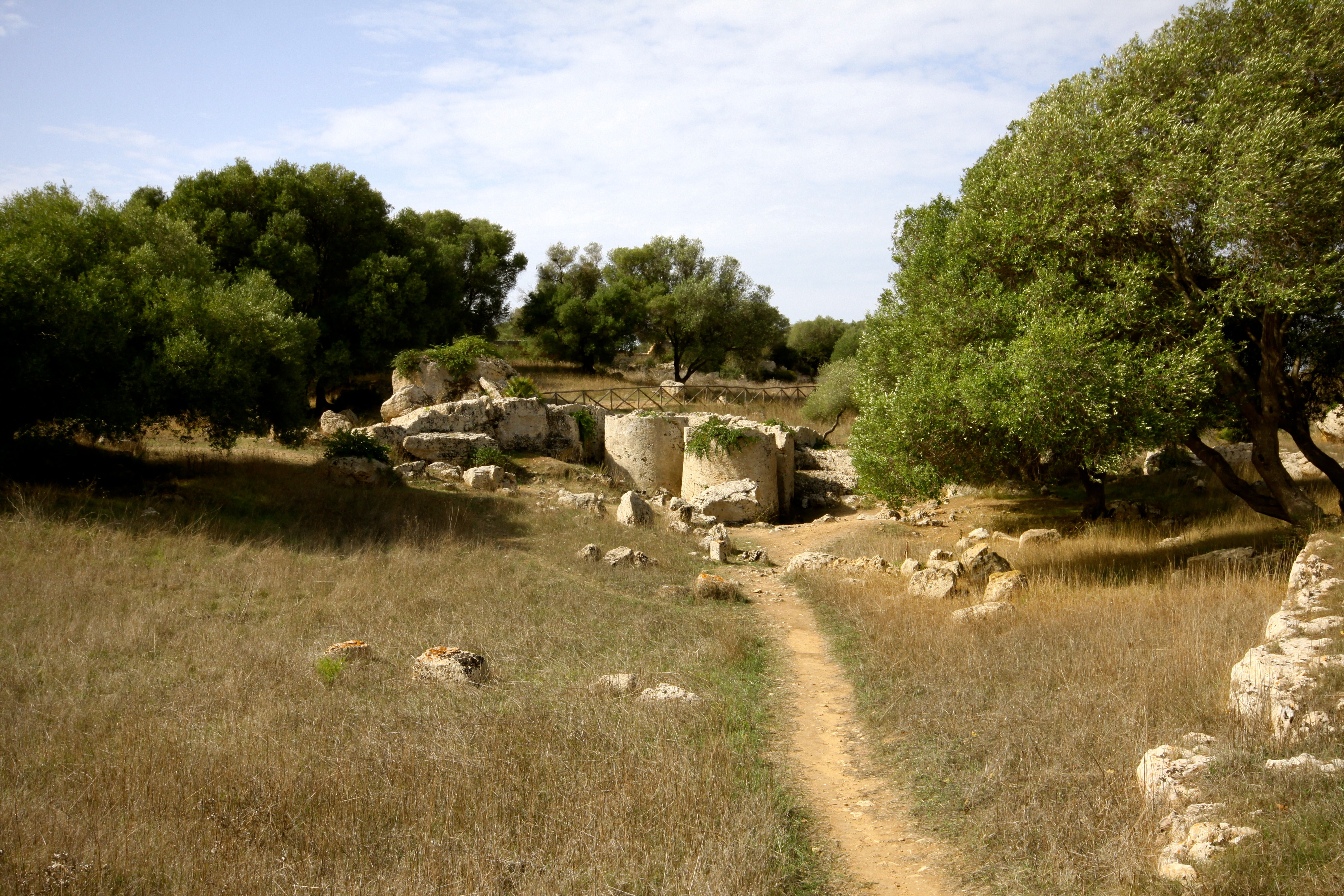 Rocche di Cusa, Campobello di Mazara Quarry for Selinunte, raw columns for unfinished temple G